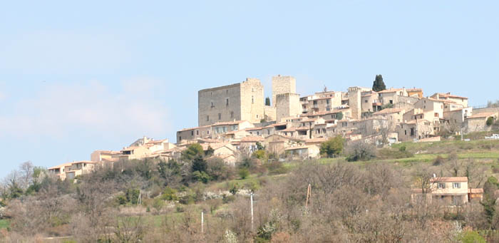 Village of Caseneuve, Vaucluse, France